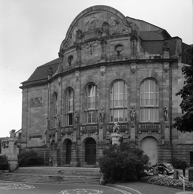 Stadttheater Freiburg mit Jugendstilgiebel